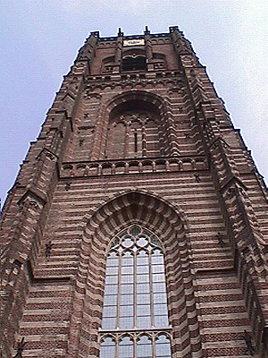 Oirschot: toren Sint-Petruskerk. Eigen werk